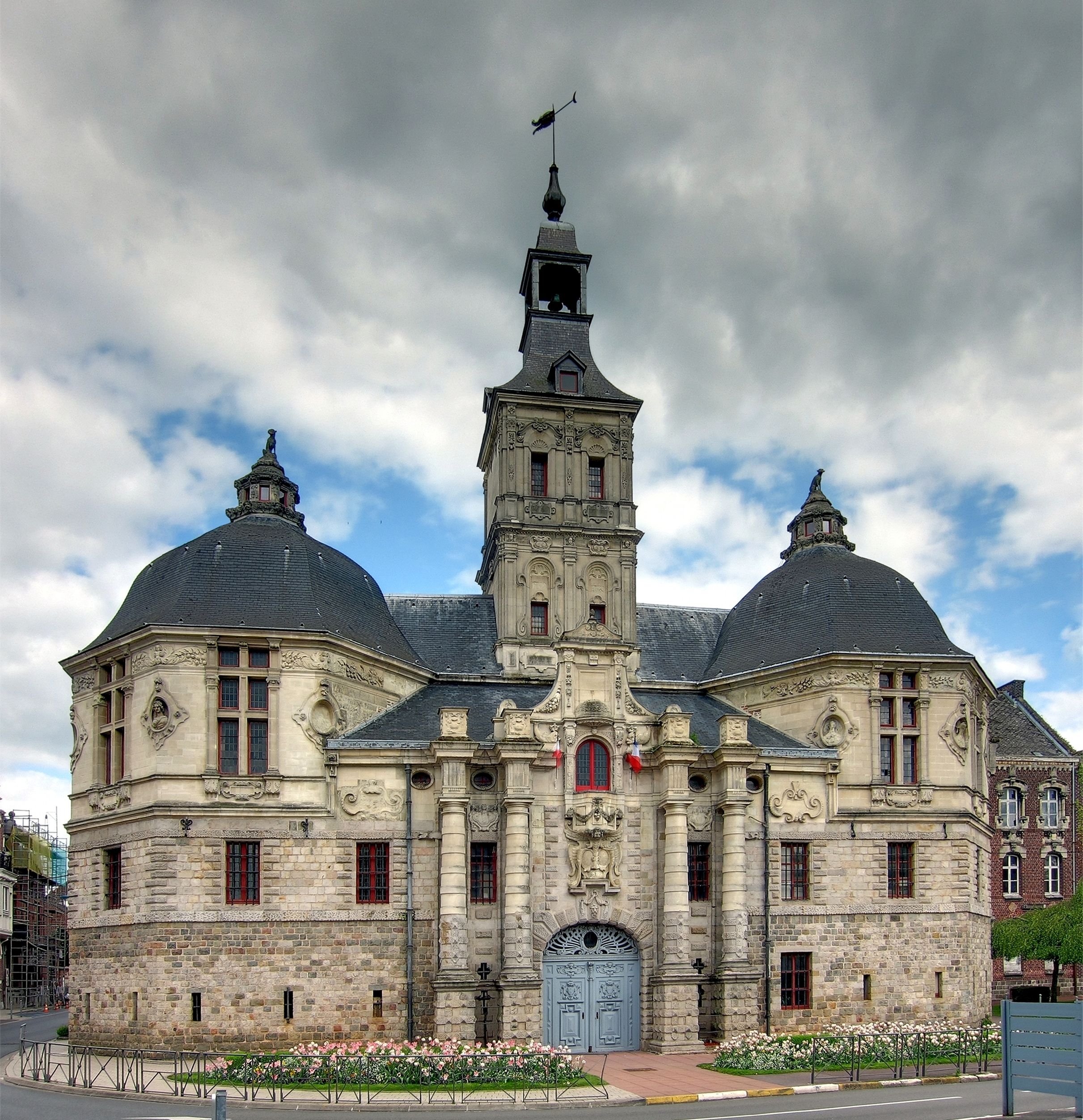 L'échevinage de l'abbaye de Saint-Amand-les-Eaux (Nord).